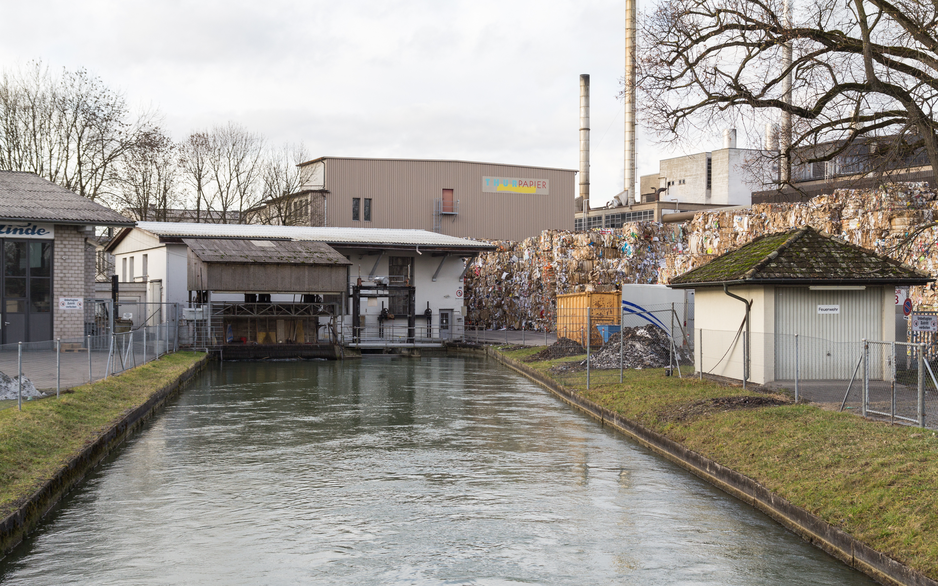 Kanal zur und Betriebsgelände der Firma Thur Papier in Weinfelden